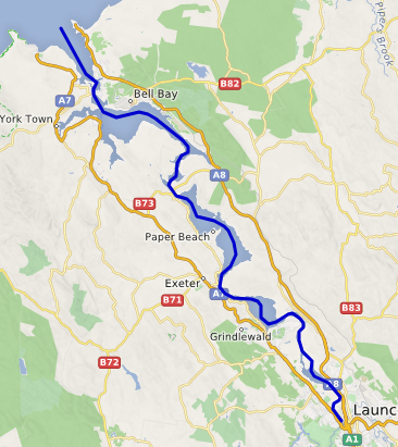 carte réalisée sur umap This map may be incomplete, and may contain errors. Don't rely solely on it for navigation.